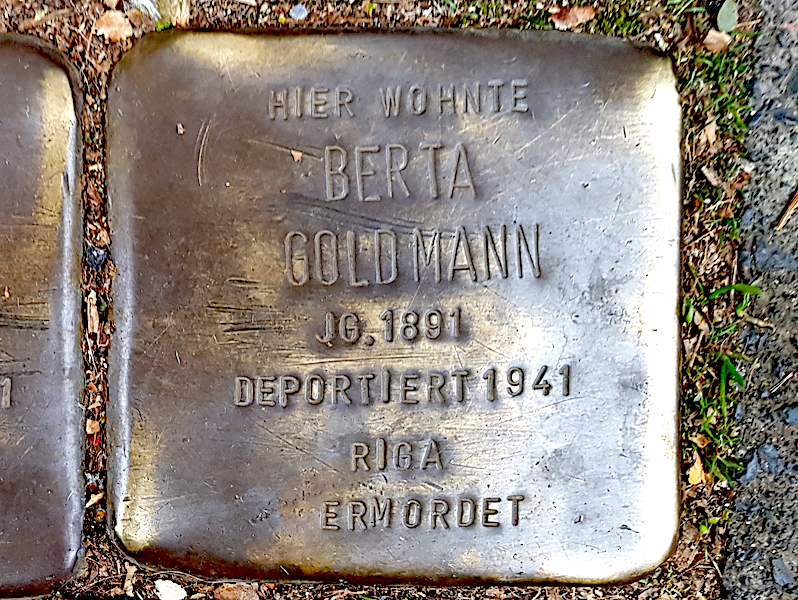 Stolperstein für Berta Goldmann, Grabens. 27, Duisburg-Neudorf, Jg. 1891, deportiert 1941, Riga, ermordet